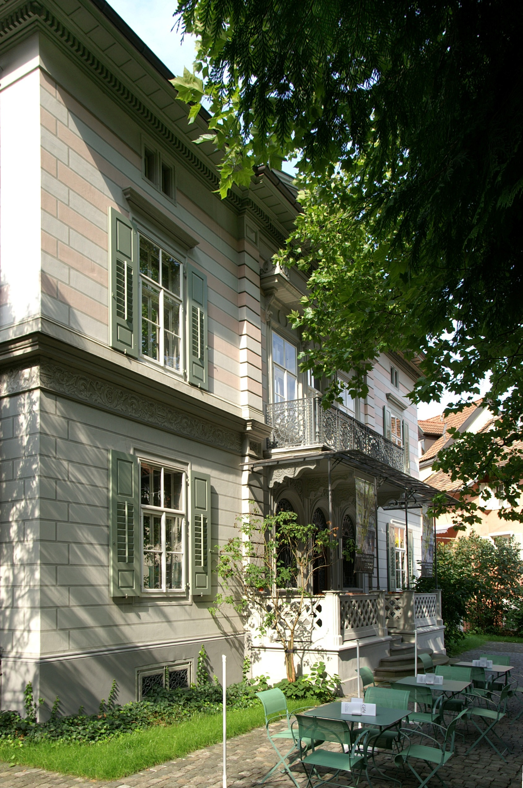 Jüdisches Museum Hohenems aus dem DEHIO Vorarlberg 1983: Schweizer-Straße Nr.5 in Hohenems; ("Burtschervilla"): Bemerkenswerte strenghistoristische Villa, erbaut um 1860-1870, kubischer Baukörper mit durch Dreieckgiebel bekröntem Mittelrisalit, stark akzentuierte Eingangspartie, originale Fassadenmalerei mit aufgemalter Nutung und Ornamentik.